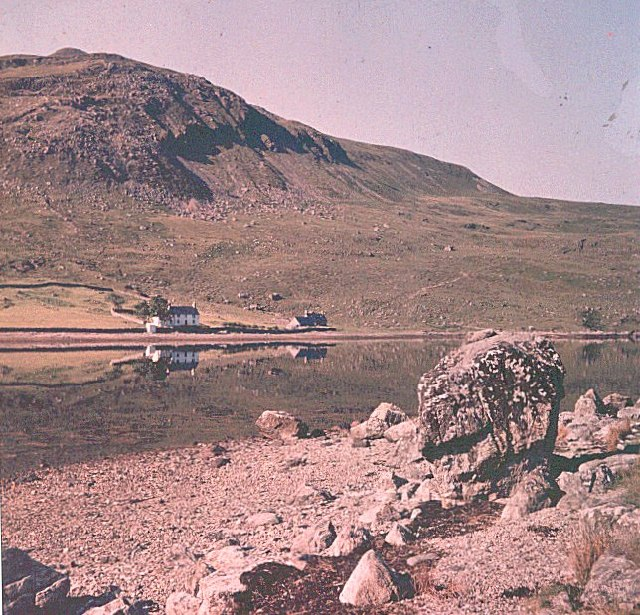 Glendhu House ca 1933 Agfacolor